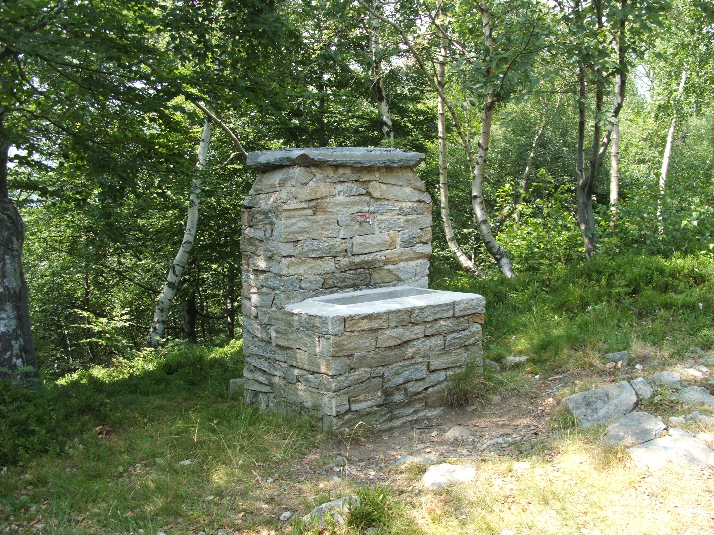 Valle Sessera, boschi di Bocchetto Séssera, Biella (Piemonte, Italia) Fontana